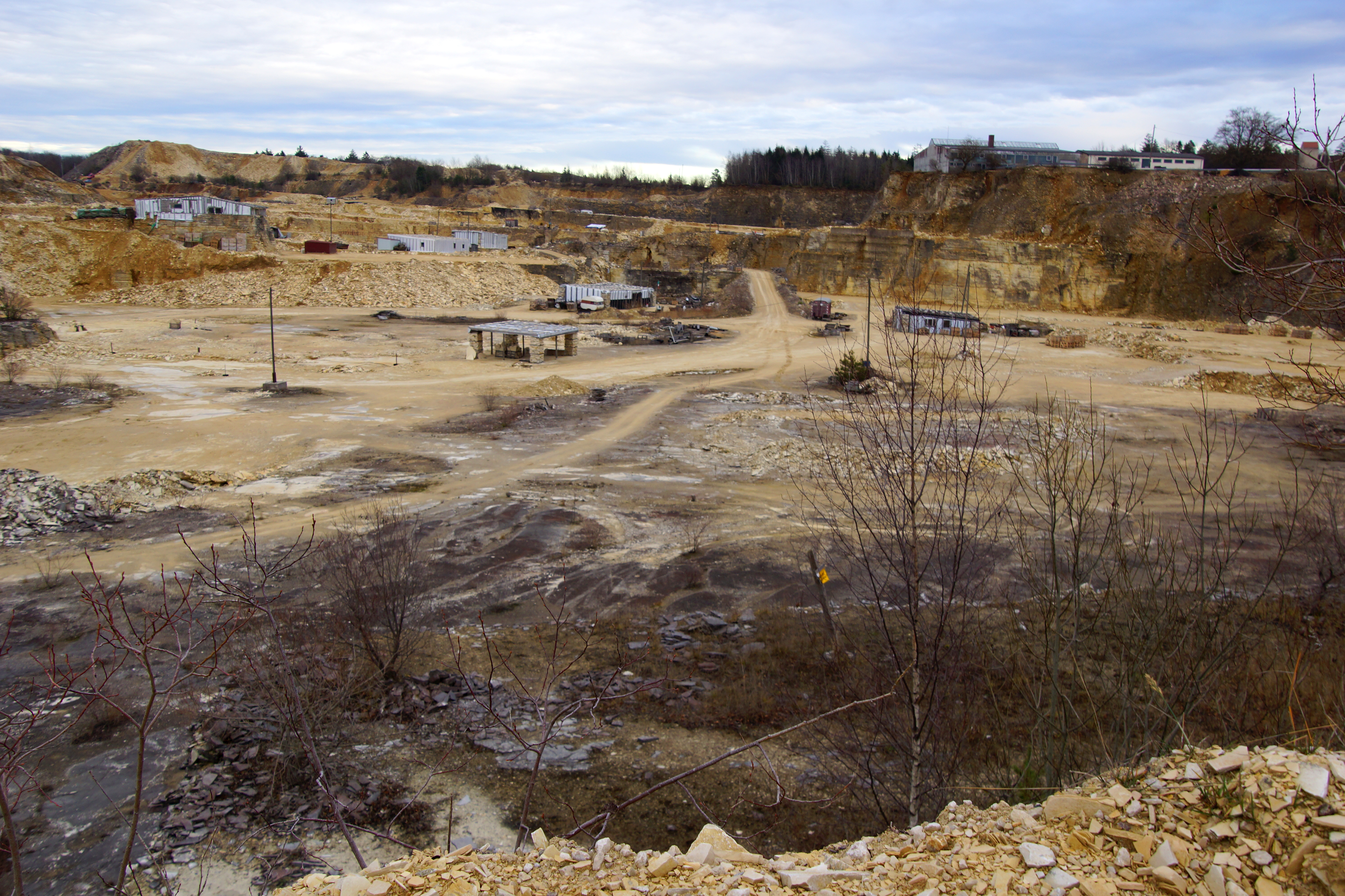 Das Steinbruchgebiet Haardt bei Langenaltheim gehört zum Solnhofer Kalksteinbruchgebiet